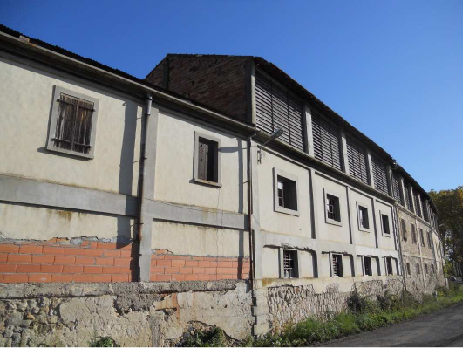 Vue du Moulin de la Tannerie depuis la route de Mendes à Montferrier